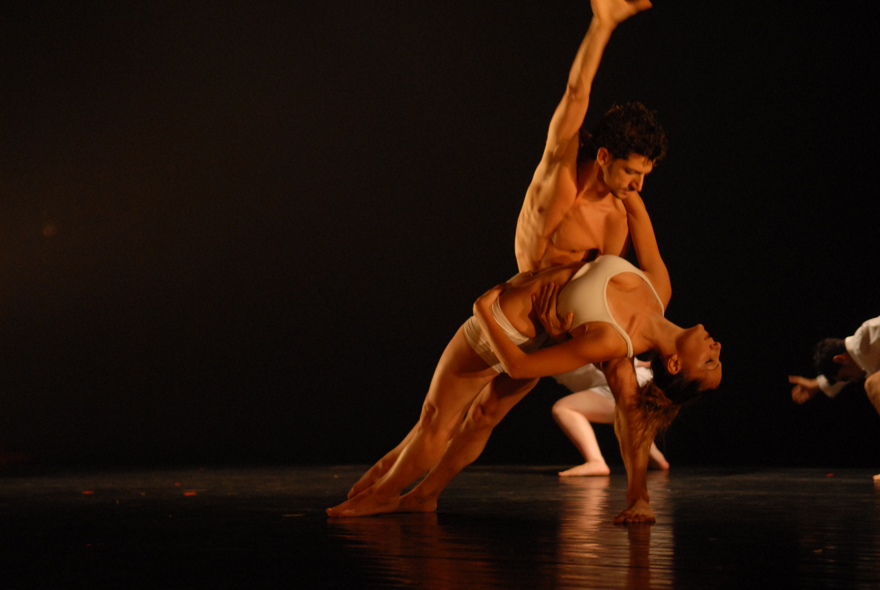 תמונת מחול. יניב ודורית.